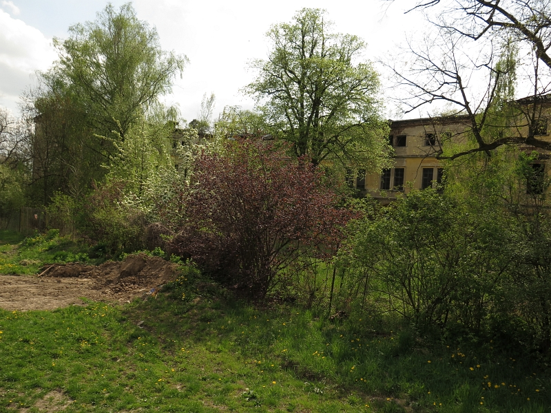 Zámek Dlouhá Loučka, Na Křivou 440, Dlouhá Loučka (okres Olomouc).